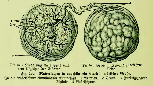 Fig. 180. Mutterkuchen in ungefähr ein Viertel natürlicher Größe. Links: Die dem Kinde zugekehrte Seite nach dem Abziehen der Eihäute. Rechts: Die der Gebärmutterwand zugekehrte Seite. In die Nabelschnur einmündende Blutgefäße: 1 Arterien. 2 Venen. 3 Zurückgezogene Eihäute. 4 Nabelschnur.